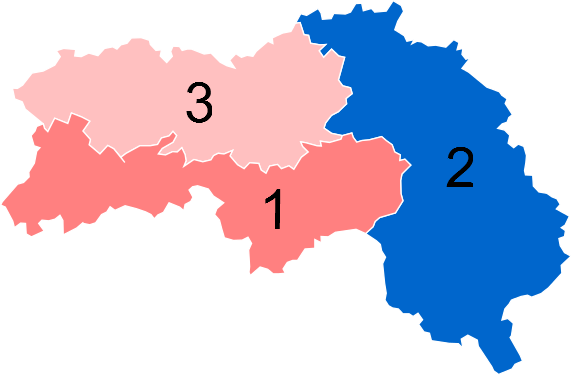 Résultats des élections législatives de l'Orne en 2012